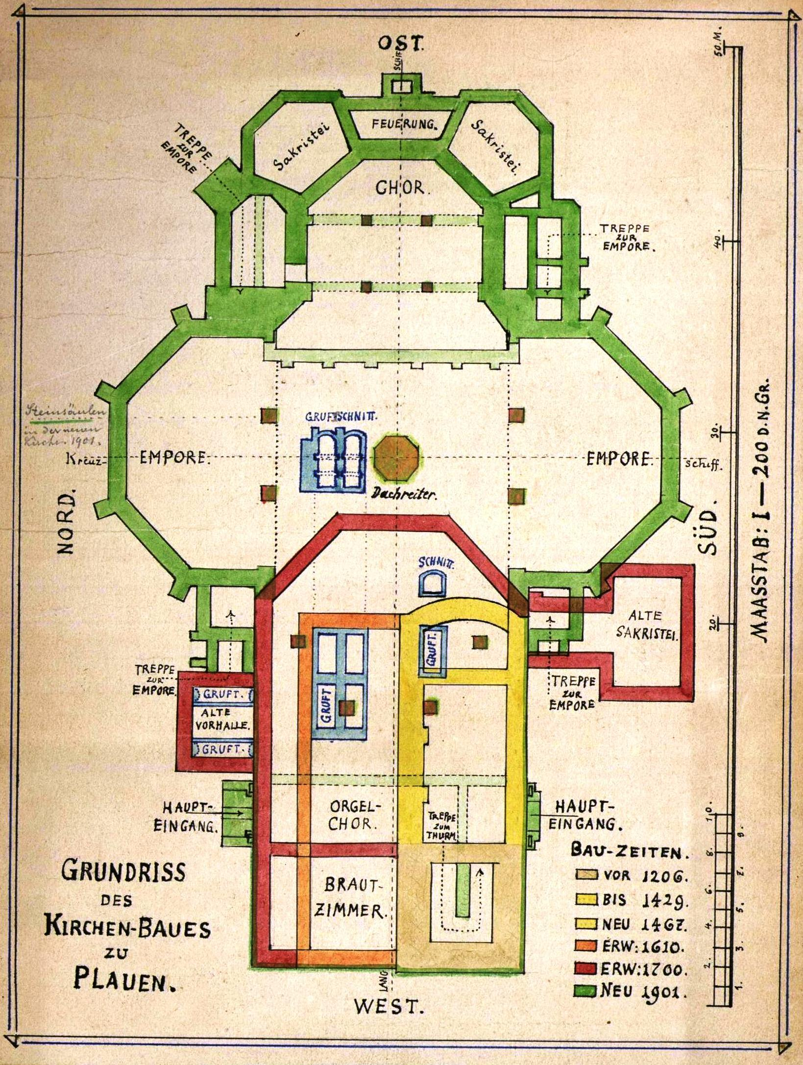 Baugeschichte der Auferstehungskirche nach Adolf Jädicke (gest. 1909)